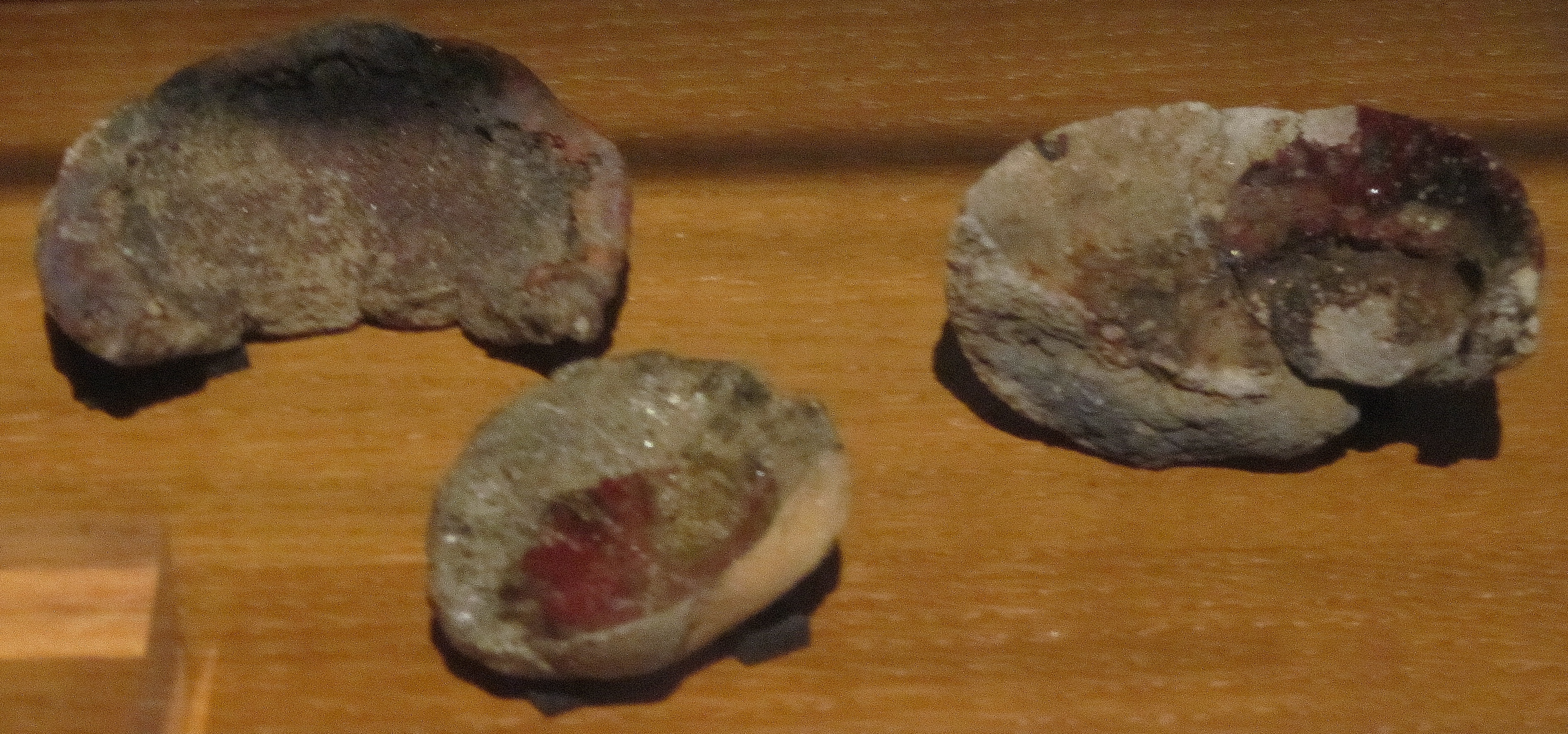 Coupelles à affinage de l'or façonnées à la main dans de l'argile crue provenant du camp des Salles en Locronan (l'alliage d'or impur est placé dans la coupelle avec du plomb ; lors de la chauffe, l'oxyde de plomb piège les métaux non précieux dans les parois de la coupelle ; l'or pur est récupéré au fond du récipient. La trace de l'arrachage de la lentille d'or est encore visible au fond de certaines coupelles (9e ou 10e siècle, Camp des Salles, exposé au musée de l'abbaye de Landévennec lors de l'exposition temporaire "La Bretagne au temps des rois" en 2018).